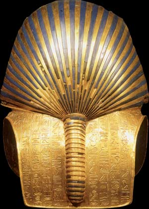 Maschera mortuaria di Tutankhamon, al museo del Cairo.